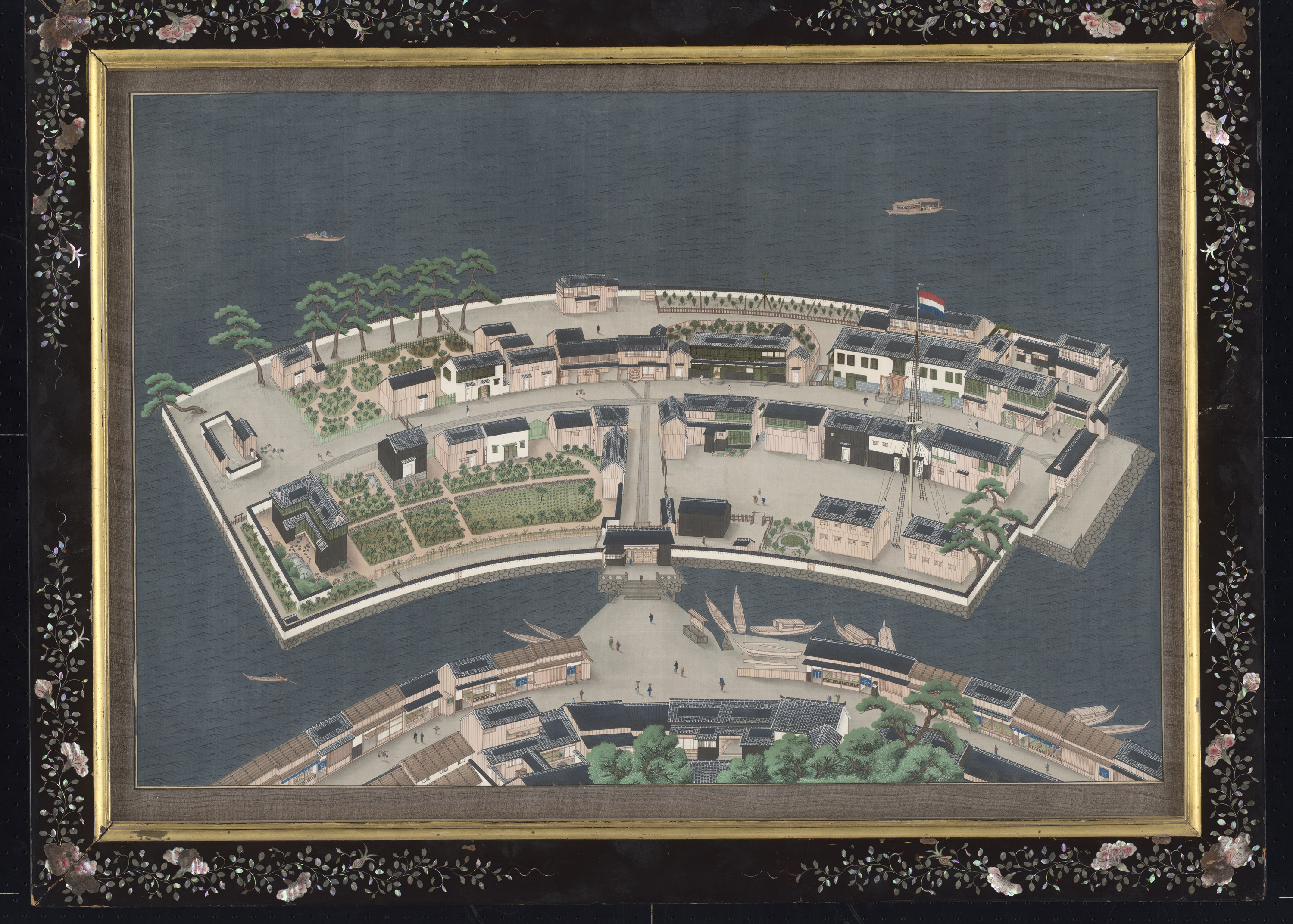 Gezicht vanuit hoog standpunt op rechthoekig eiland Deshima met halfronde lange zijden. Op voorgrond verbindingspoort met vaste land en deel van bebouwde oever. Eiland is in de lengterichting bebouwd; rechtsvoor hoge mast met rood-wit-blauwe vlag. Afgebeeld zijn twintig personen, verdeeld over het eiland. Geheel boven: water met daarop twee roeiboten (één open en één met overkapping). Op voorgrond: gesloten poort en trap die naar bebouwde oever loopt waar negen boten liggen aangemeerd en een open roeiboot vaart. Op de oever zijn een aantal huizen en delen van bomen zichtbaar, evenals zesentwintig personen. Kleuren van schildering: blauw, rose, bruin/grijs en groen. Afbeelding is op zijde gespannen met houten ondergrond; dit raamwerk zit in klein passepartout dat is bespannen met grijs textiel; glas ervoor. Dit geheel is gevat in houten gelakte lijst. Zwart lakwerk ingelegd met parelmoer in blad- en bloemmotieven. Langs glasrand zit goudlakwerk. Lijst kent vele beschadigingen. Keerzijde: zwart houten plank met twee verticale gleuven. Label Line: Kawahara Keiga, ca. 1833 - ca. 1846, aquarelverf op zijde Collection: Japan (collectie); schilderingen